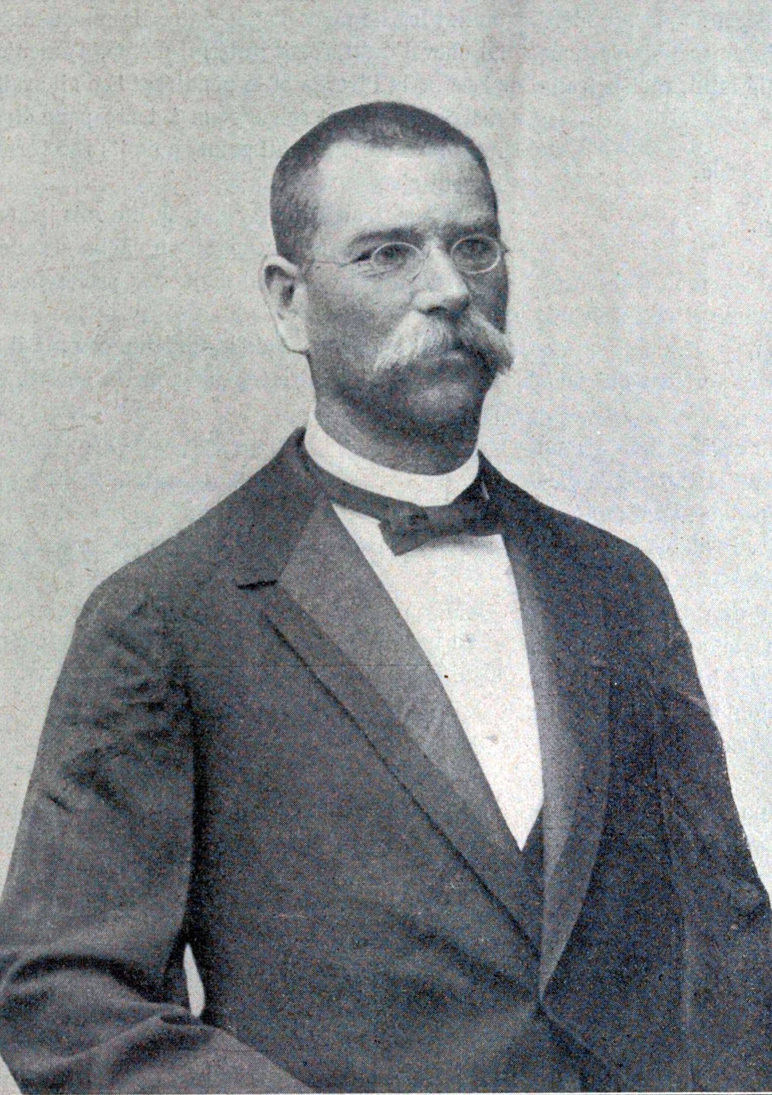 "M. Ilg, ministre du négus Ménélik".